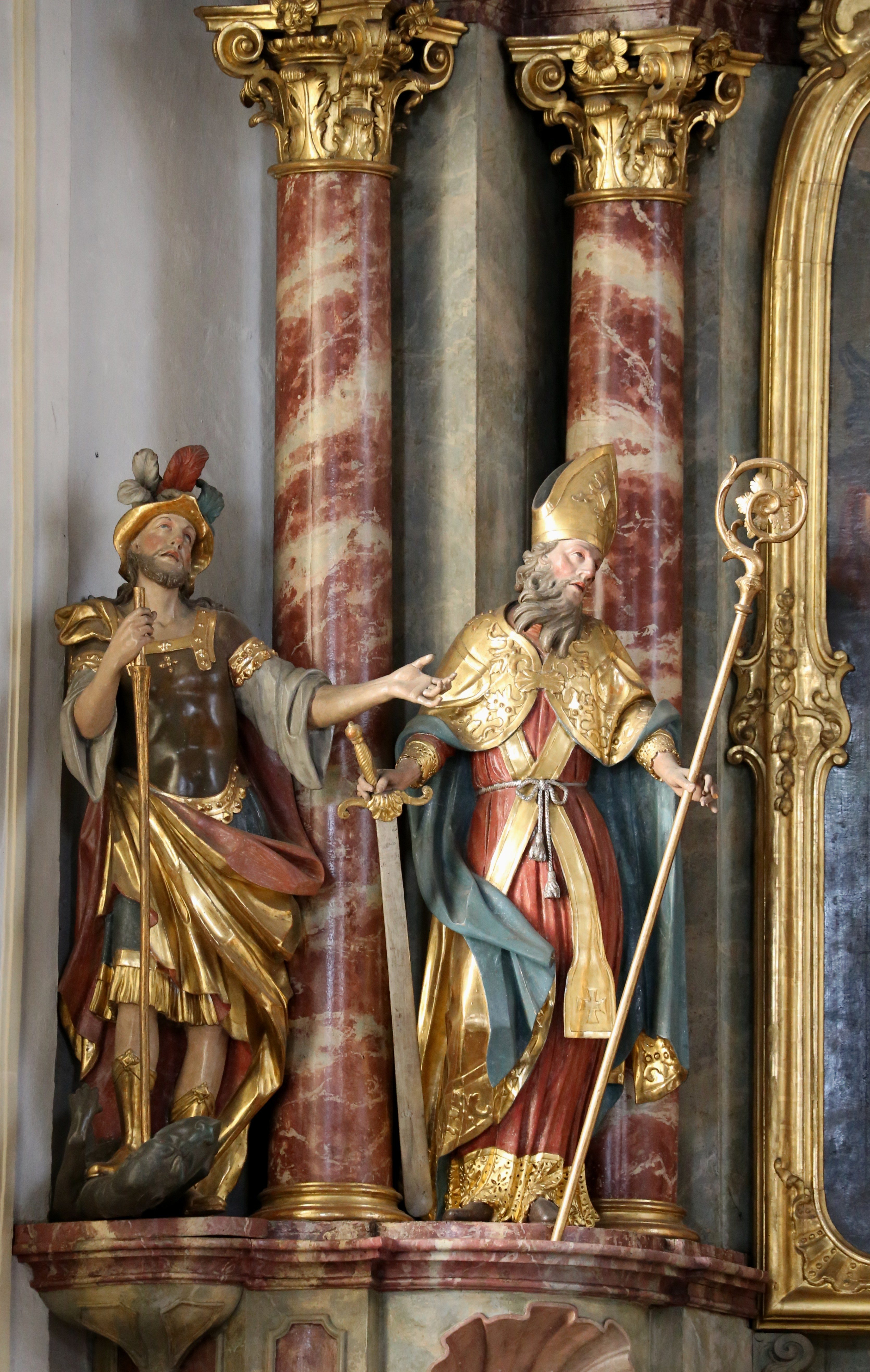 Stadtplatz 101a, Burghausen; Institutskirche, sogenannte Schutzengelkirche, Saalbau von Johann Martin Pöllner, 1731